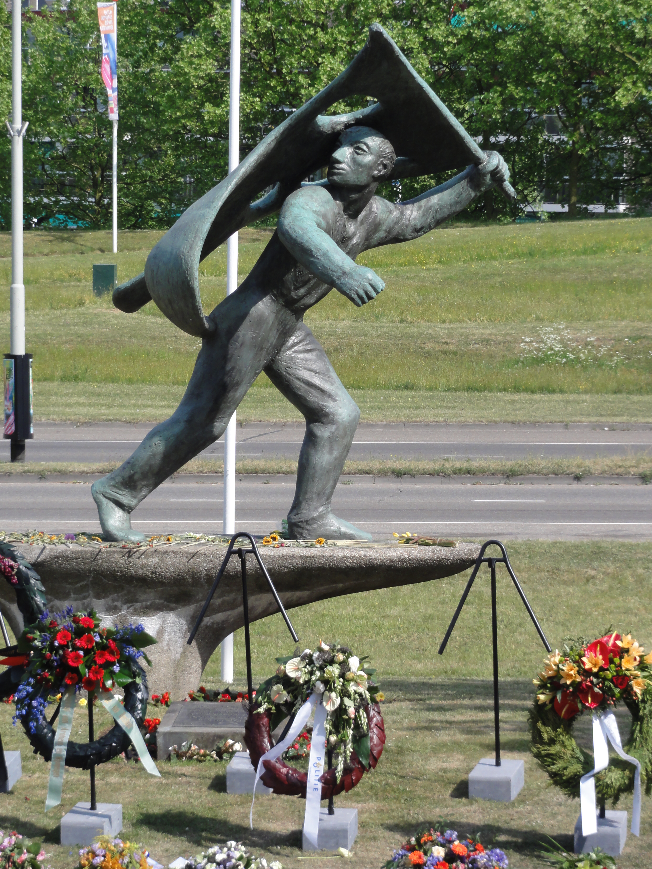 Nijmegen, Trajanusplein, Verzetsmonument, met kransen van dodenherdenking 2011